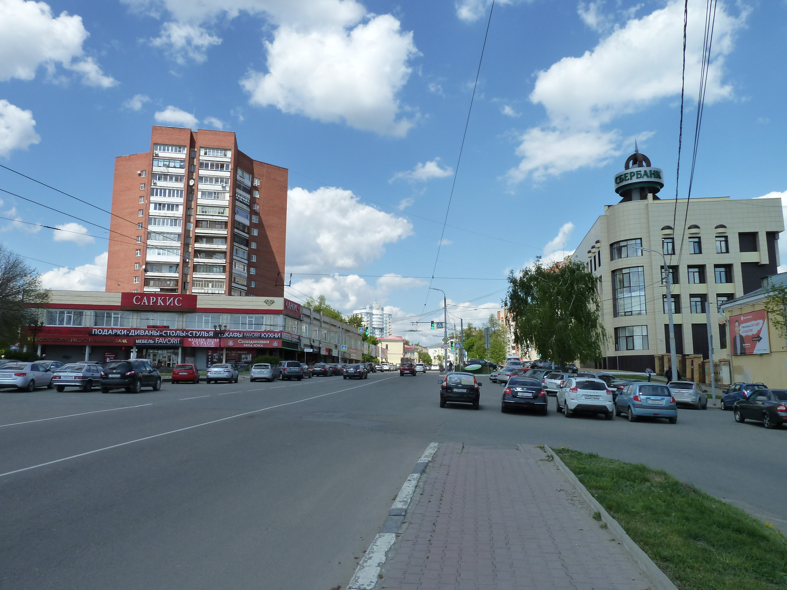 Брестская улица в городе Орле; слева жилой дом "трилистник"